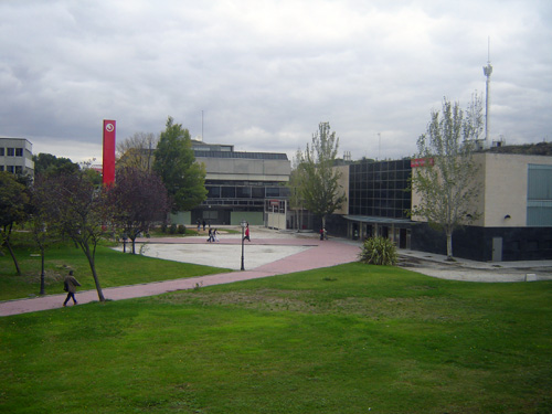 Estación de Cantoblanco-Universidad de Cercanías RENFE. Foto hecha el 6 de noviembre de 2006 desde el comedor ubicado en el Pabellón B de la Universidad Autónoma de Madrid.